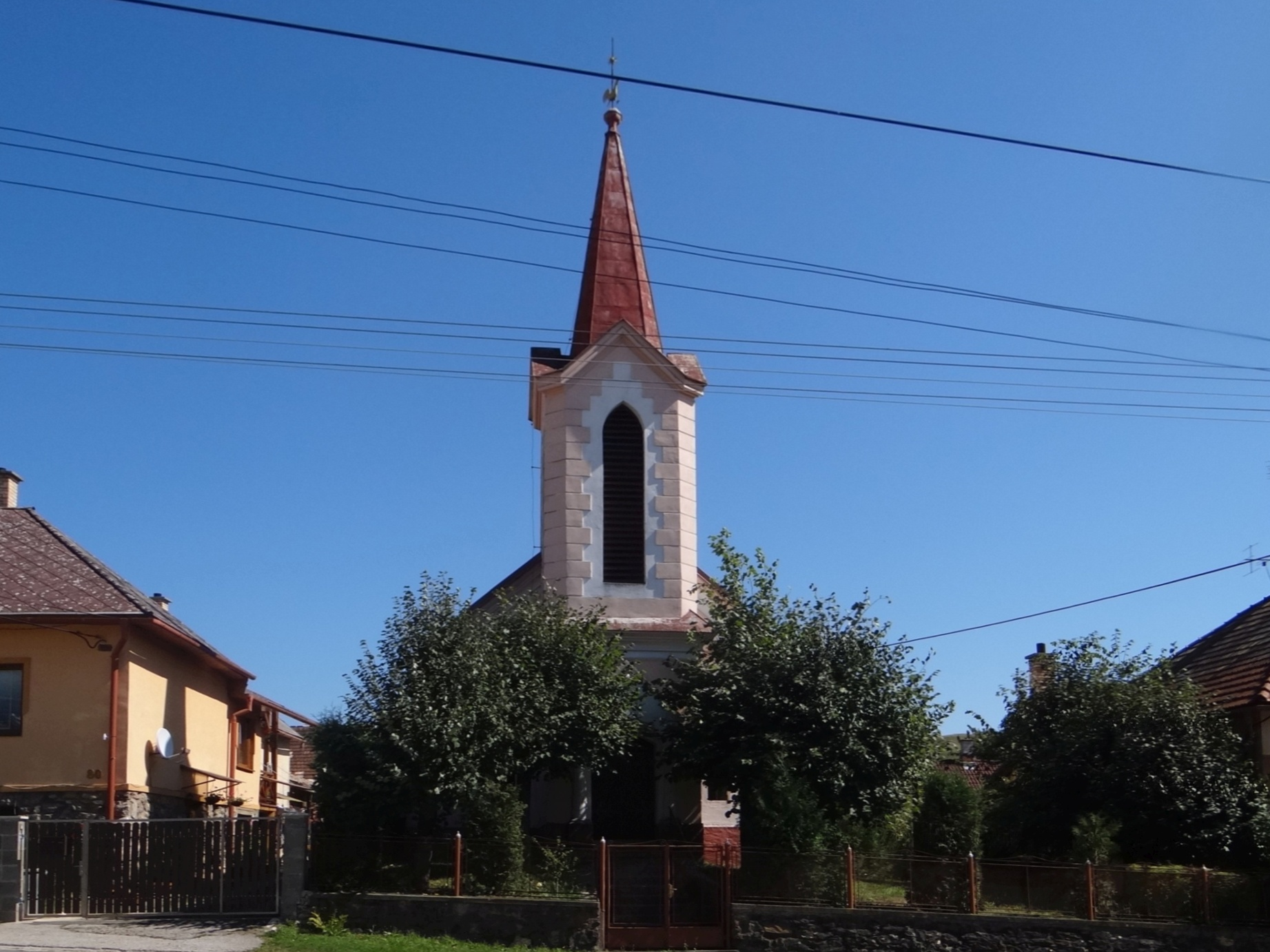 Rudná